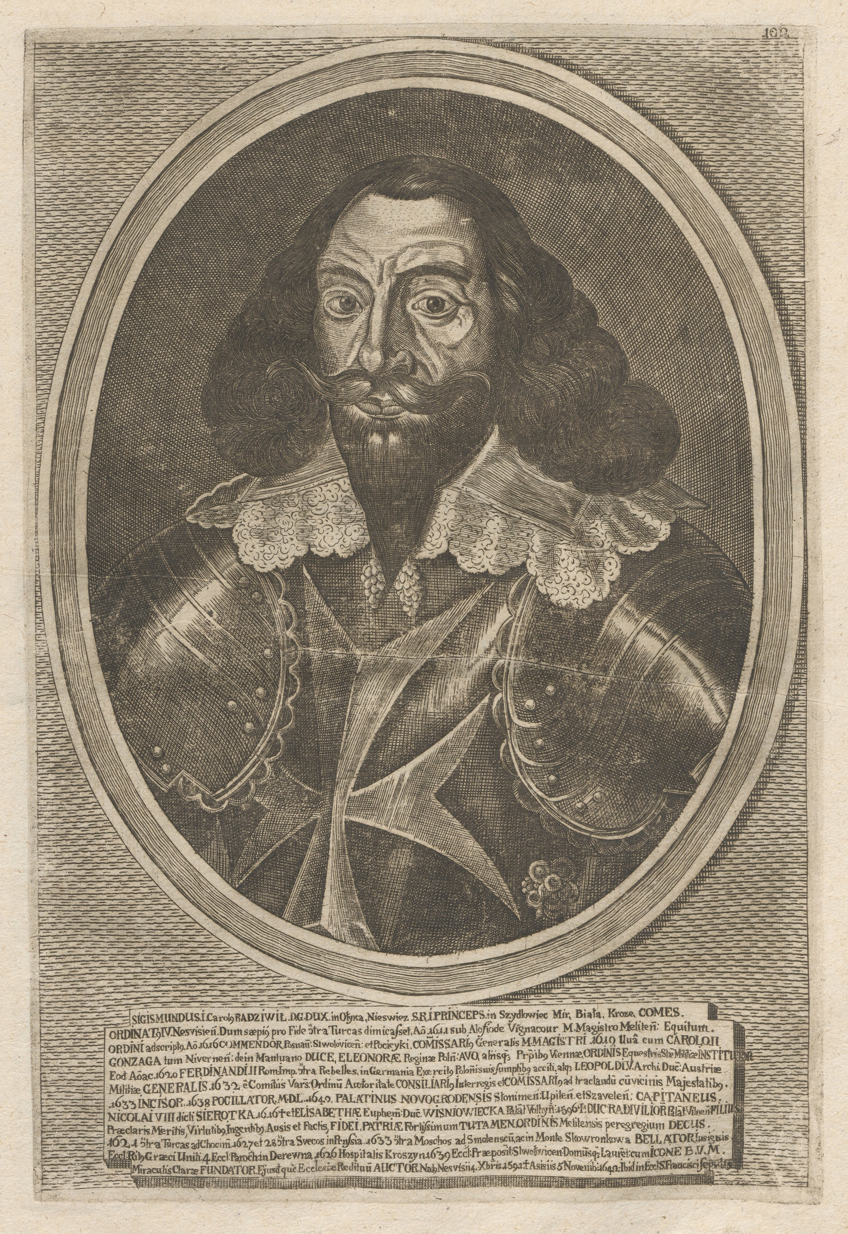 Беларуская (тарашкевіца): Партрэт Жыгімонта Караля Радзівіла (Žygimont Karal Radzivił)